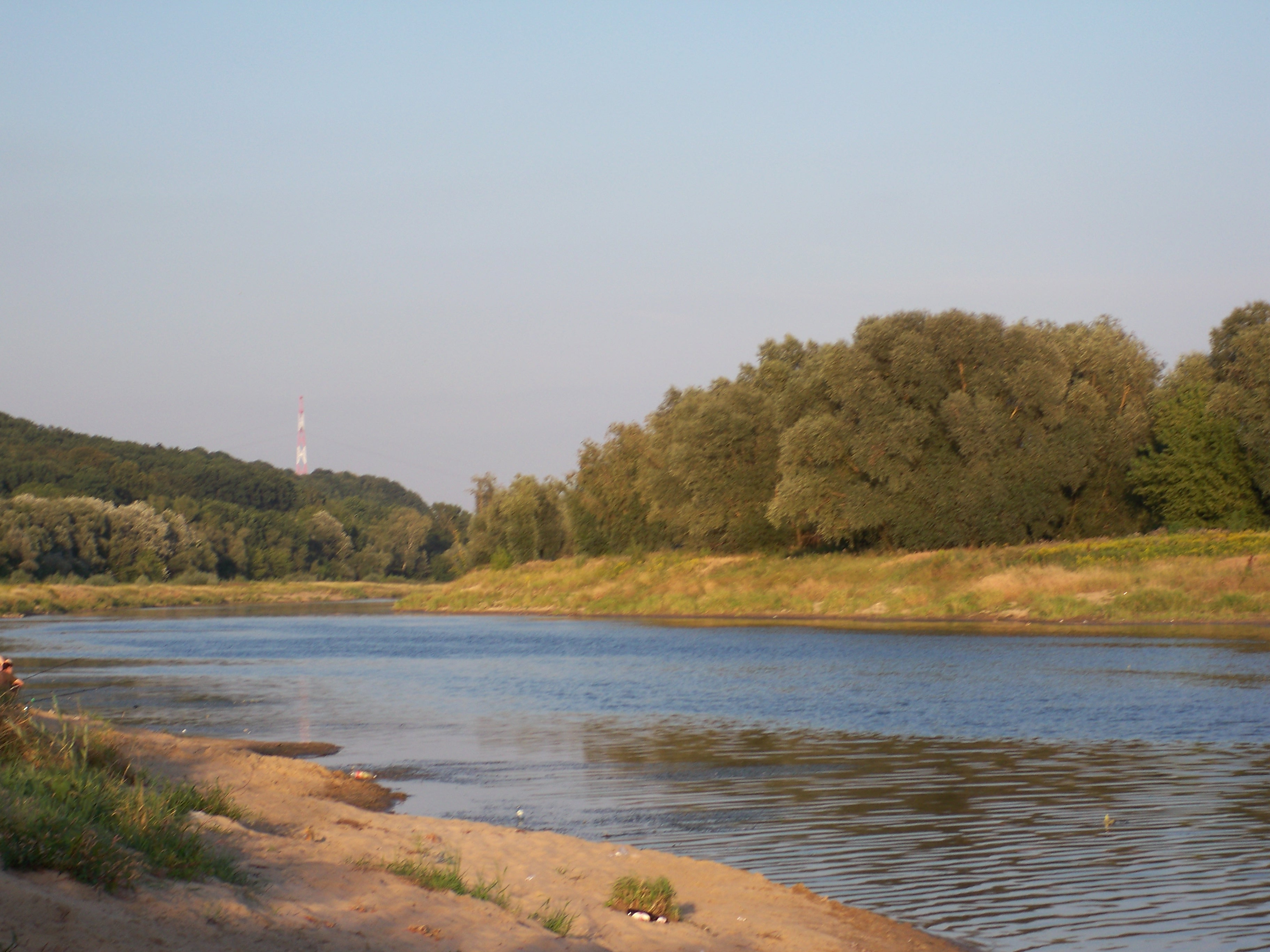 Wisła we Włocławku (2009 r.)